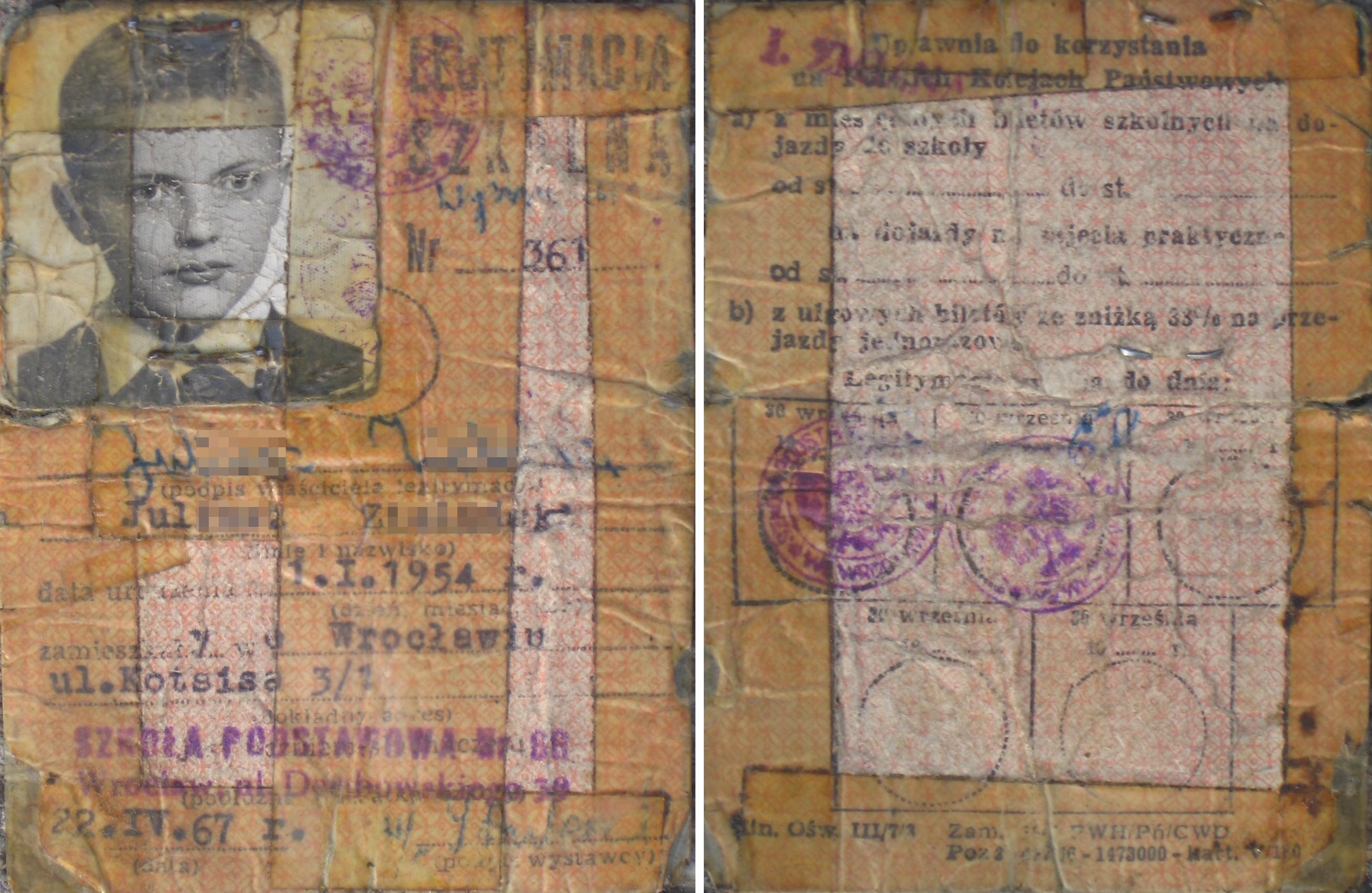 Legitymacja szkolna z roku 1967